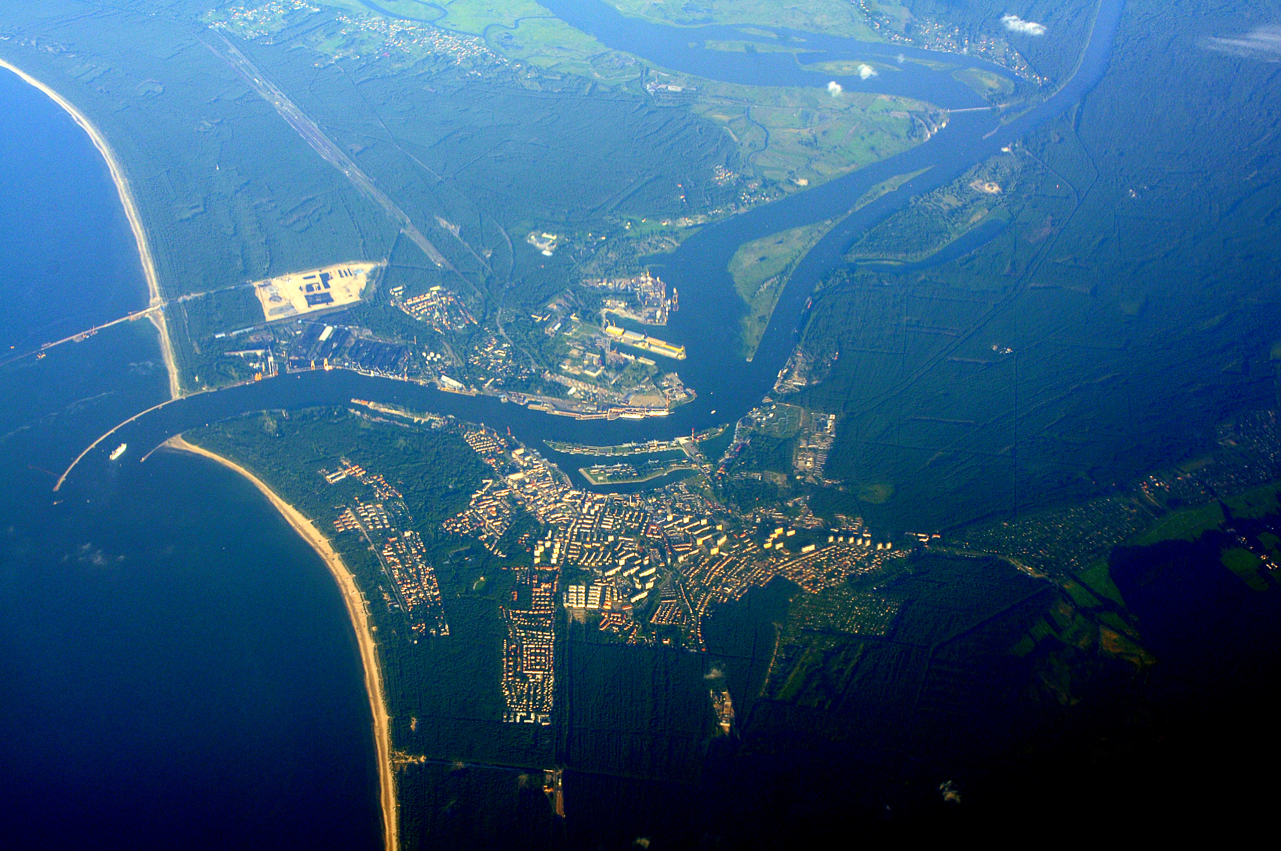 Swinemünde